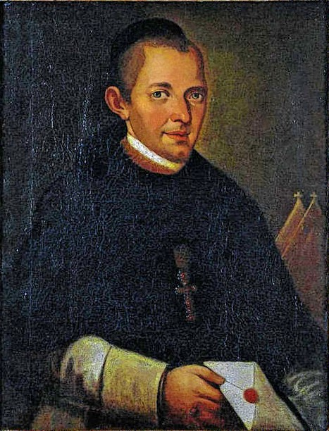 Abt Nivard Schlimbach OCist